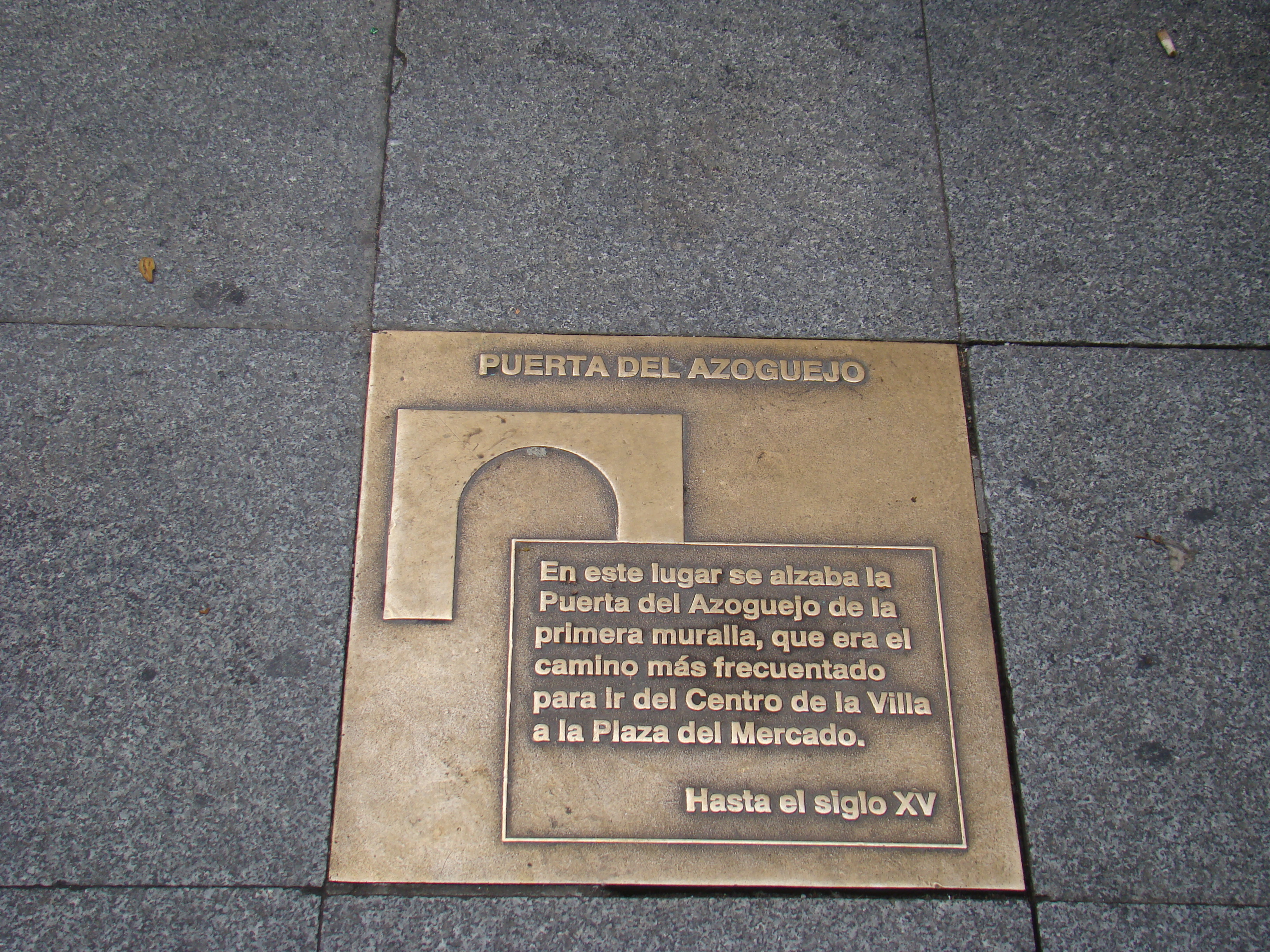 Valladolid, España. Vestigios de la muralla del siglo XII-XIII. Placa en el suelo en la calle de la Platería indicando que allí había una puerta de la muralla, la puerta del Azoguejo.